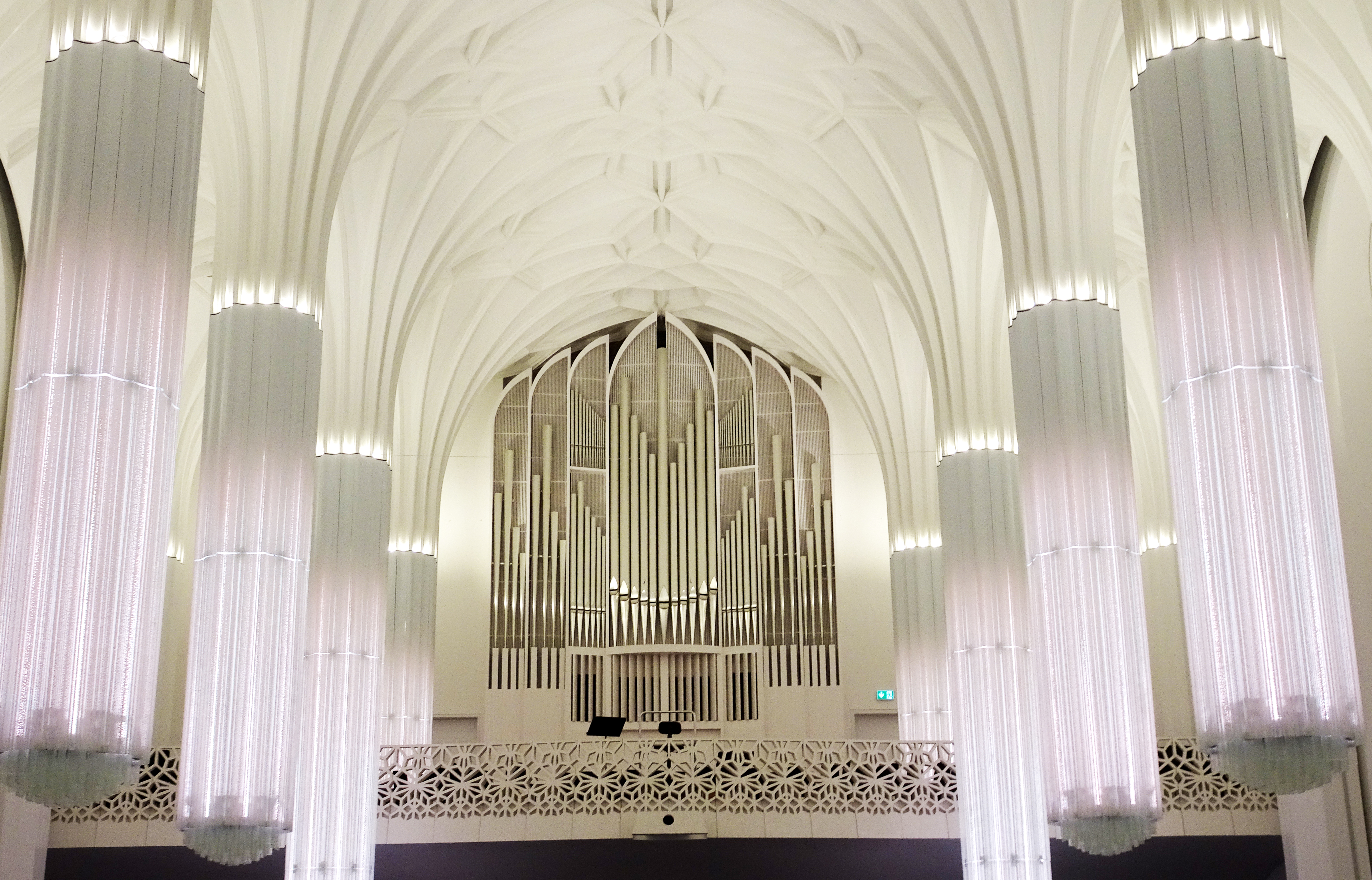 Jehmlich-Orgel in der Universitätskirche St. Pauli zu Leipzig